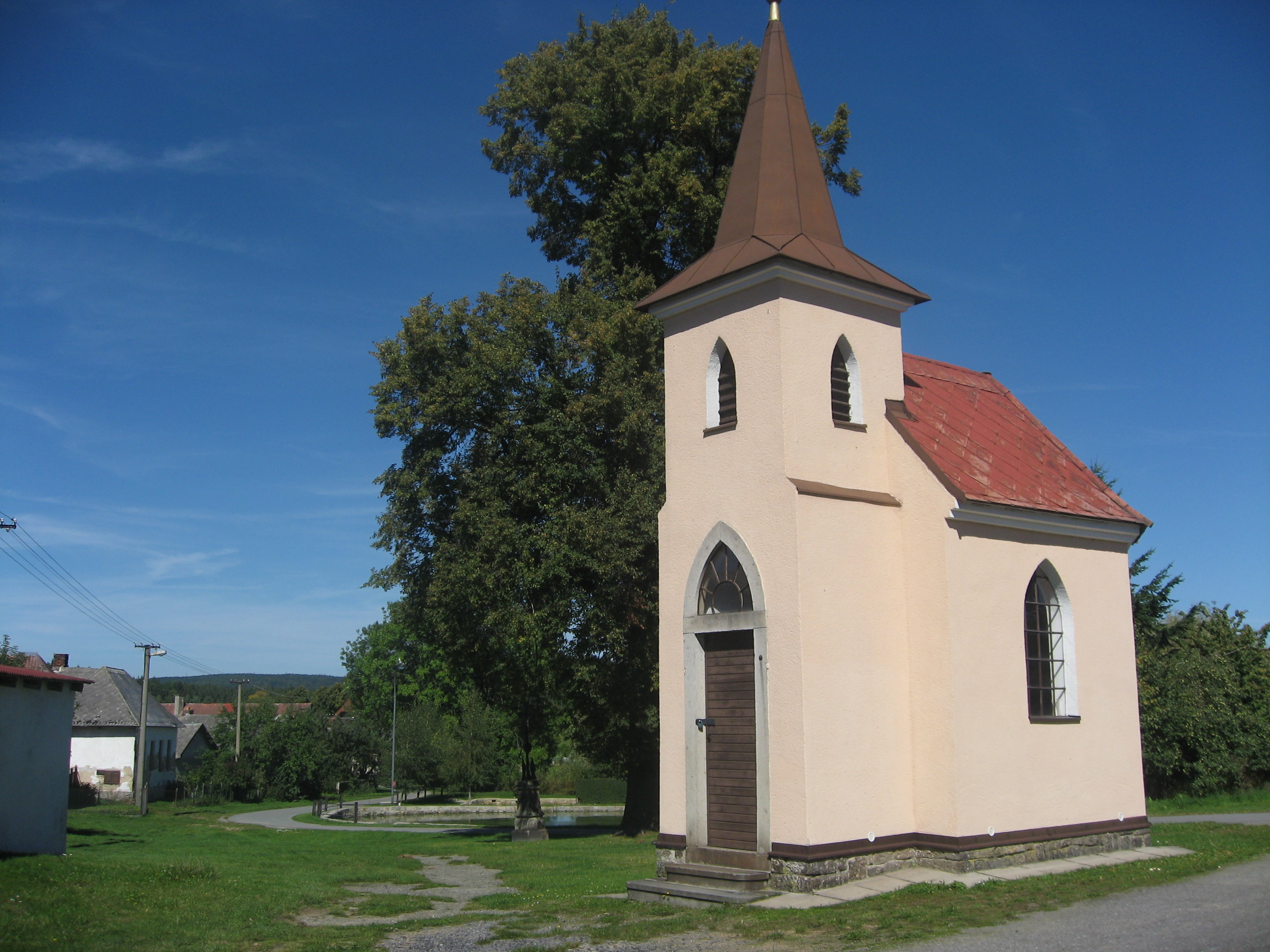 Proseč (u Humpolce), okres Pelhřimov - kaple